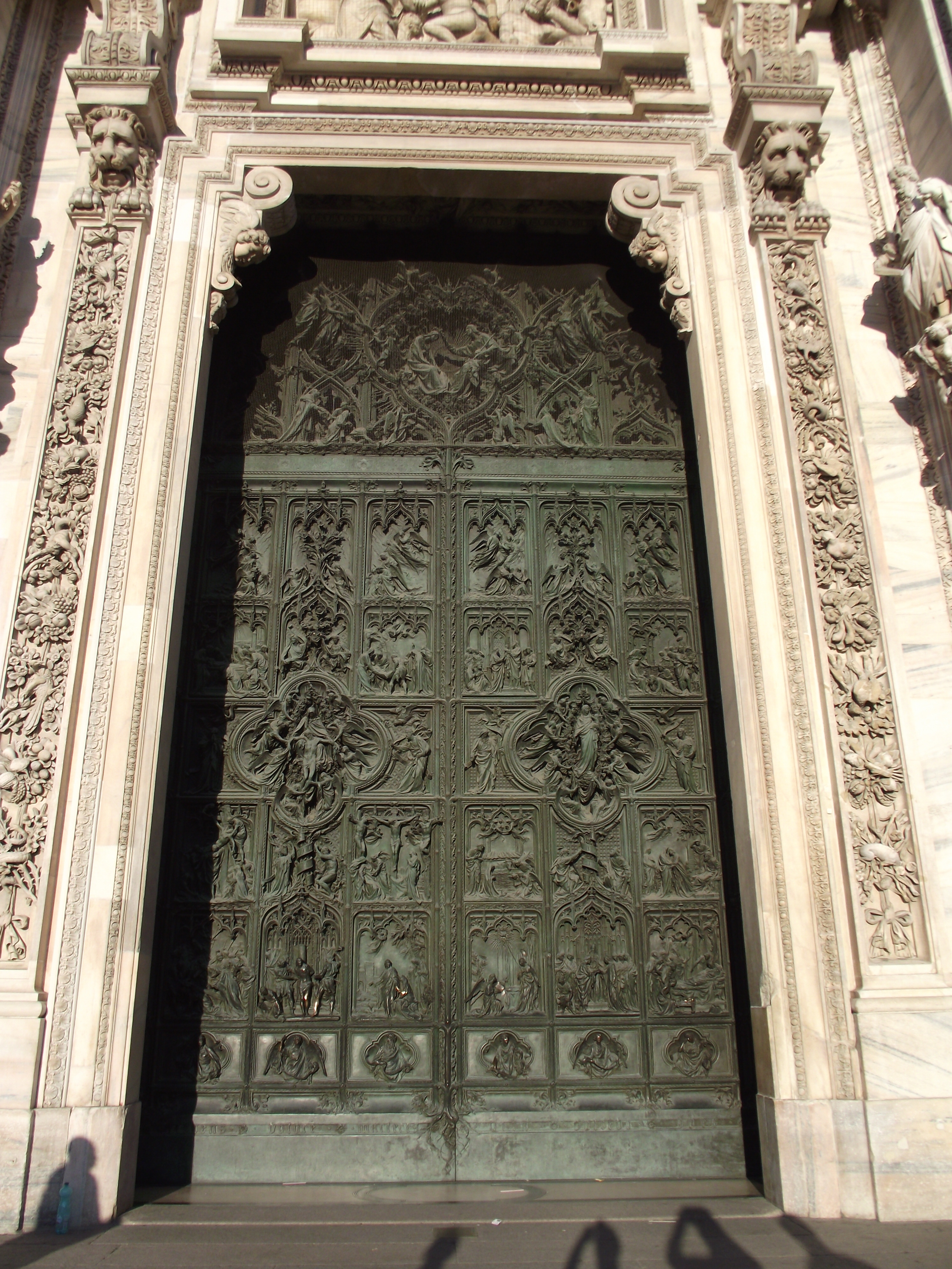 Porta maggiore centrale